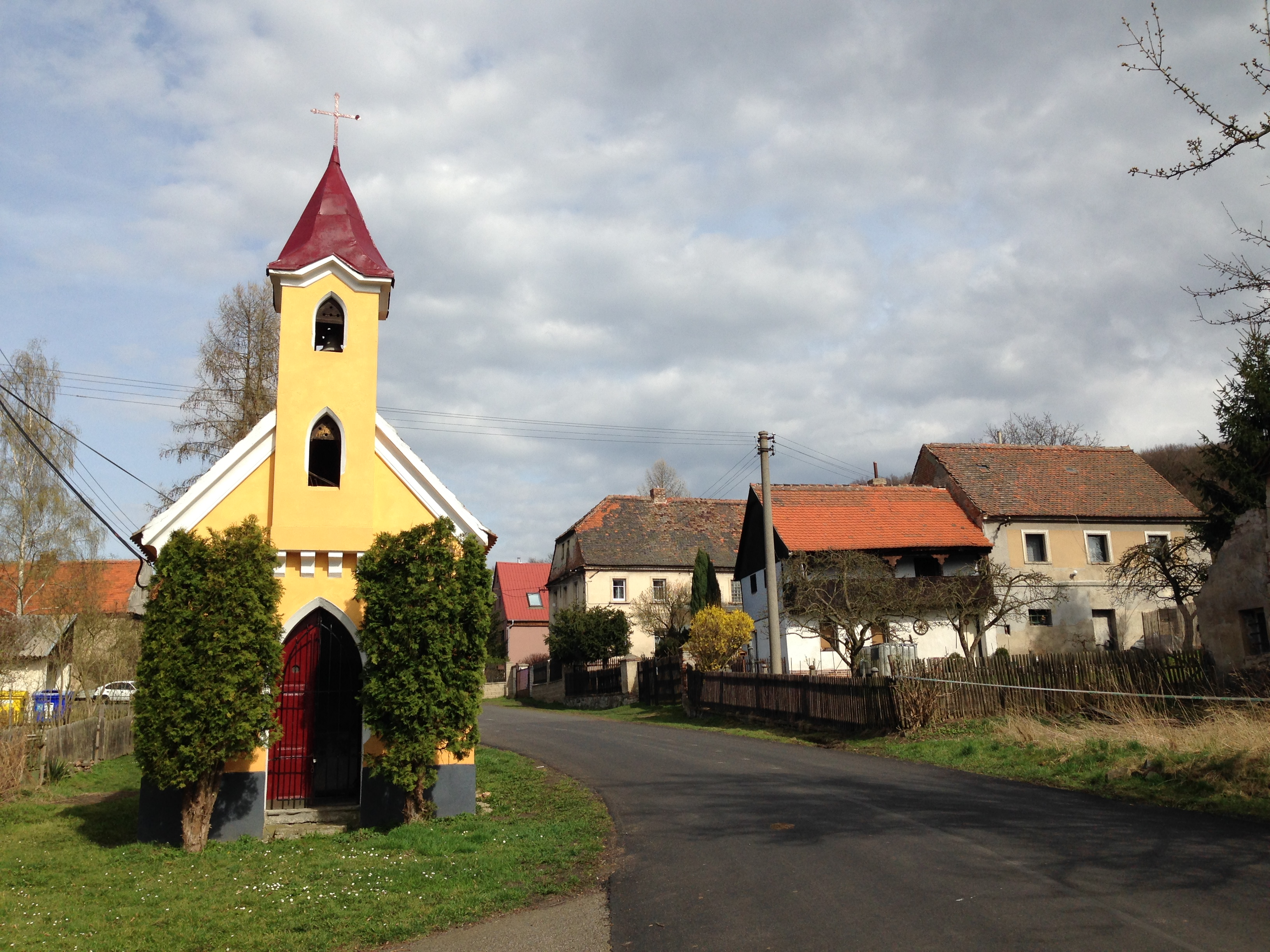 Kaple sv. Floriána ve vesnici Suchá, části obce Stebno.